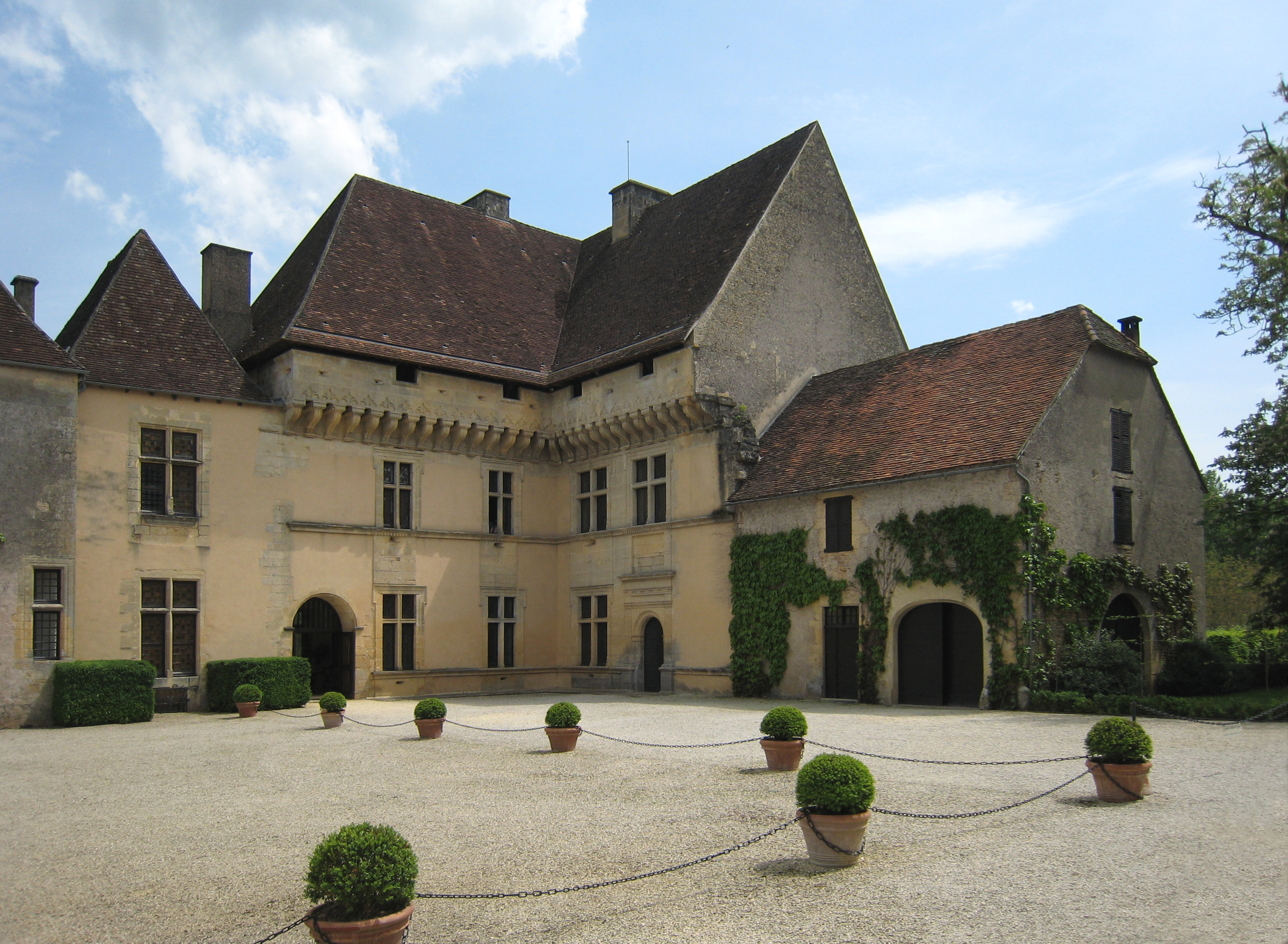 Chateau de Losse, Département Dordogne/France